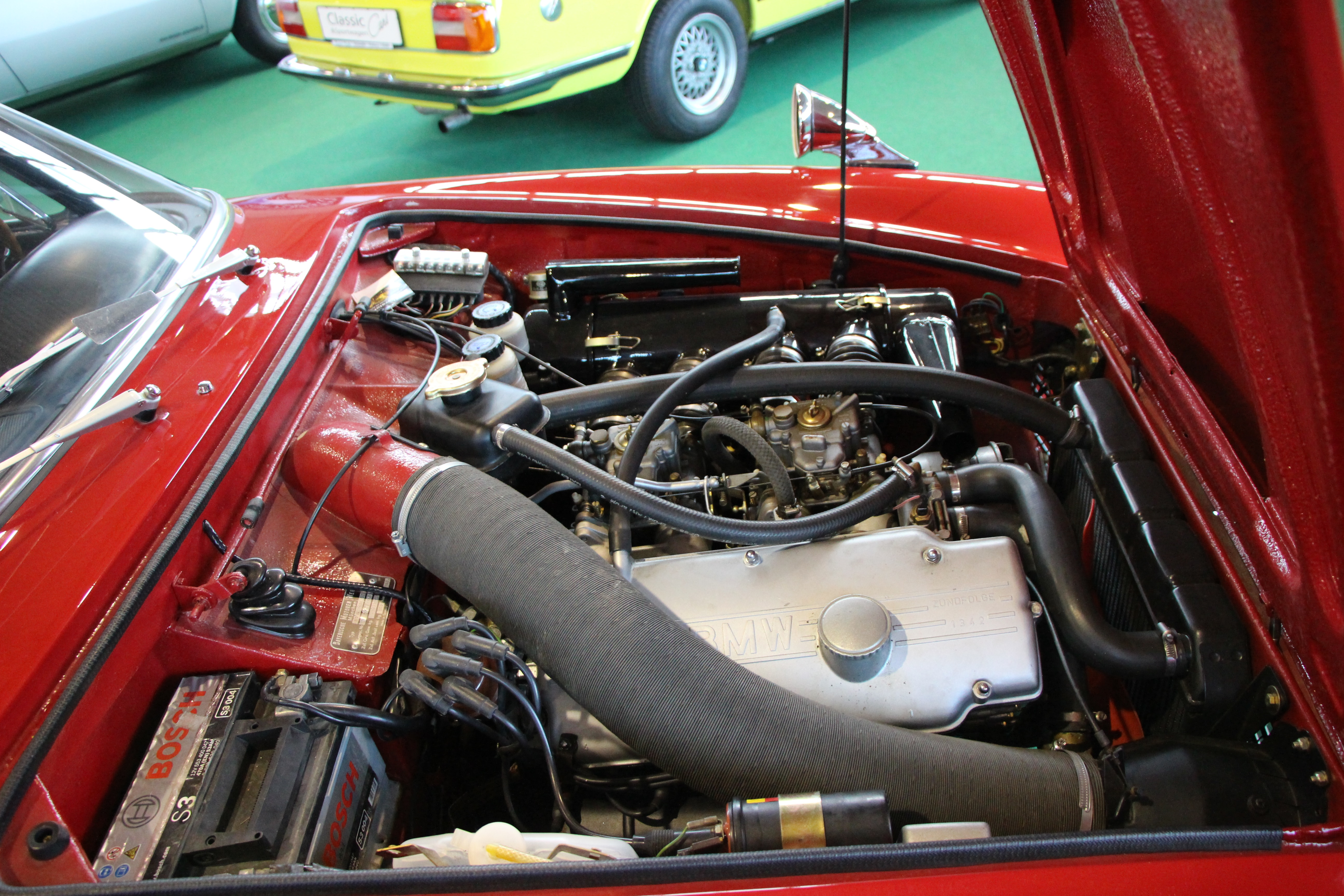 BMW 1600GT, Motorraum